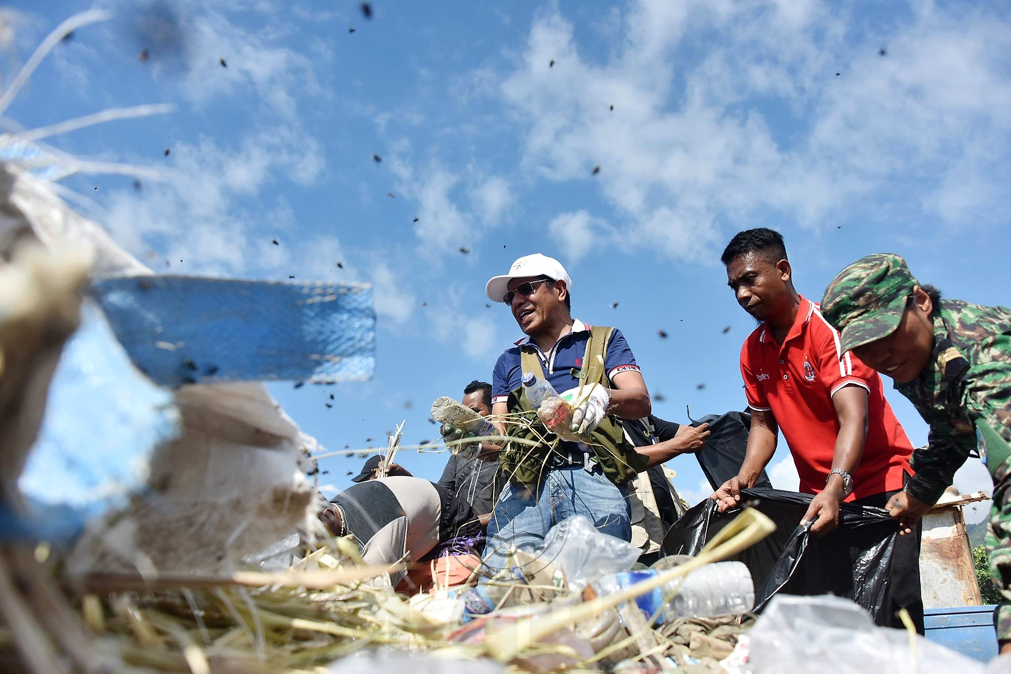 Tetun: PRIMEIRU-MINISTRU HUSU SIDADAUN SIRA NIA KONTRIBUISAUN BA KOMBATE LIXU